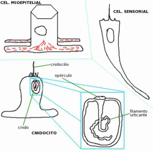 Tipos celulares cnidarios